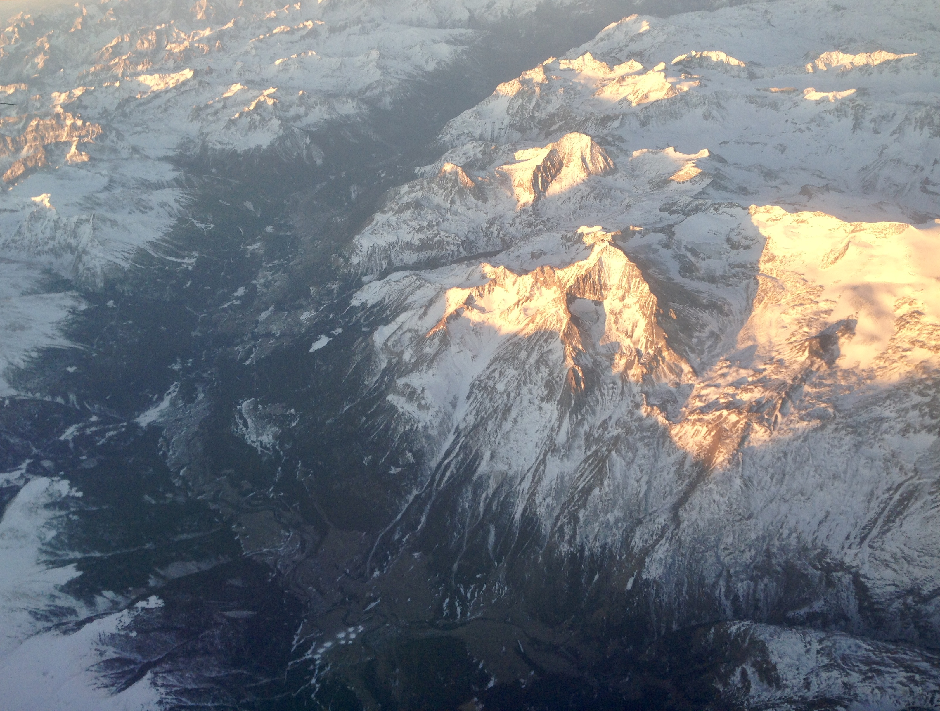 Vue aérienne de la Maurienne